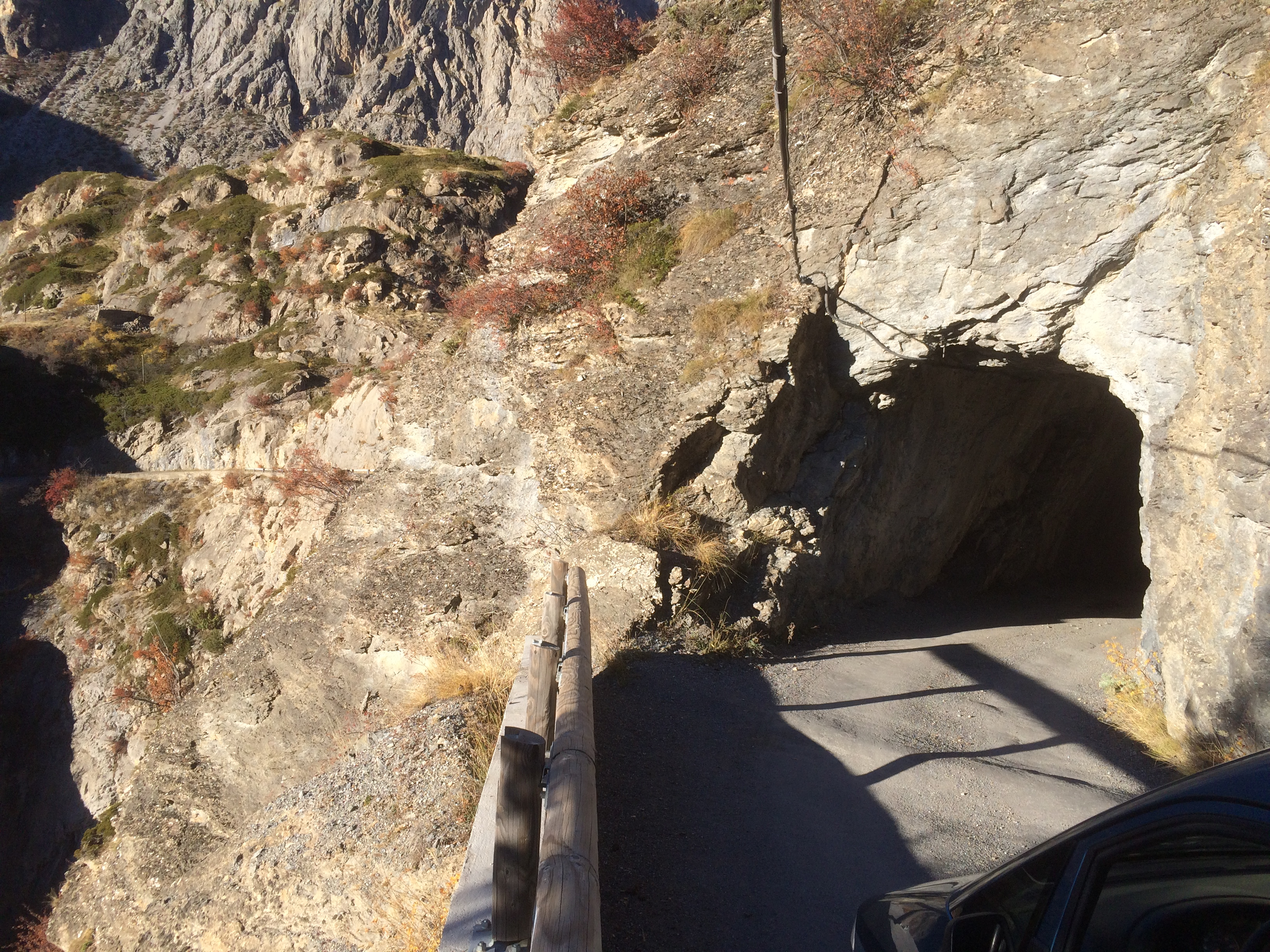 En arrière plan à gauche, on aperçoit légèrement l'étroite prolongation de la voie passant sur l'autre rive.